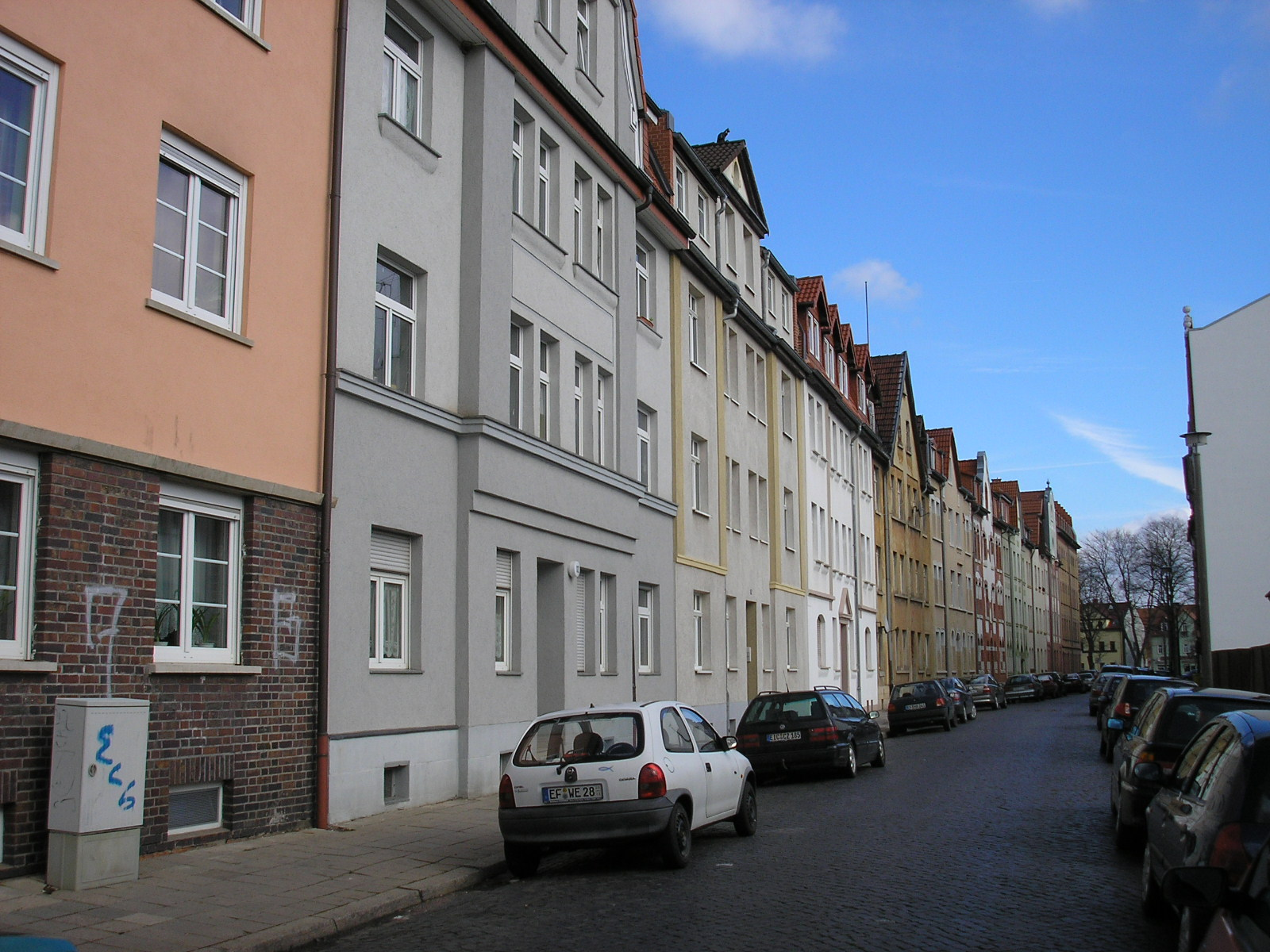 Blick durch die Braunstraße in Erfurt-Ilversgehofen (Thüringen).